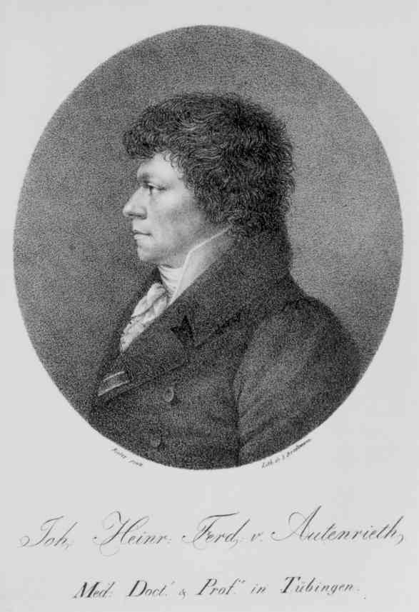 Johann Hermann Heinrich Ferdinand von Autenrieth (* 20. Oktober 1772 in Stuttgart; † 2. Mai 1835 in Tübingen) war ein deutscher Mediziner.